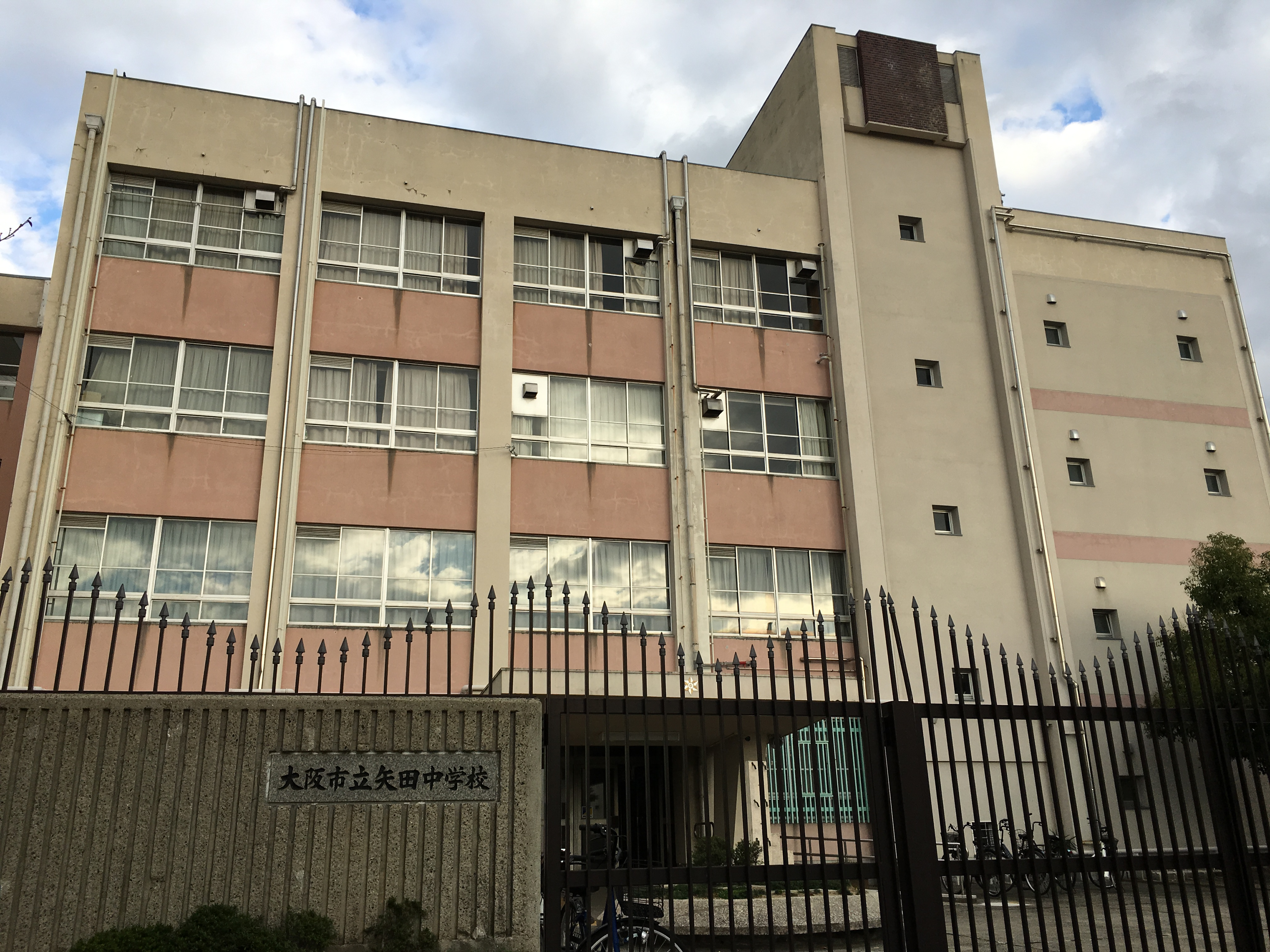 矢田中学校